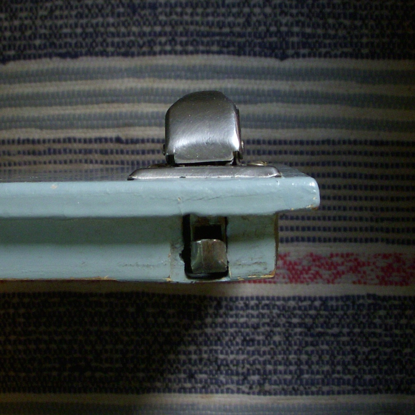 En överfalsad kökslucka på ett 1950-tals kök